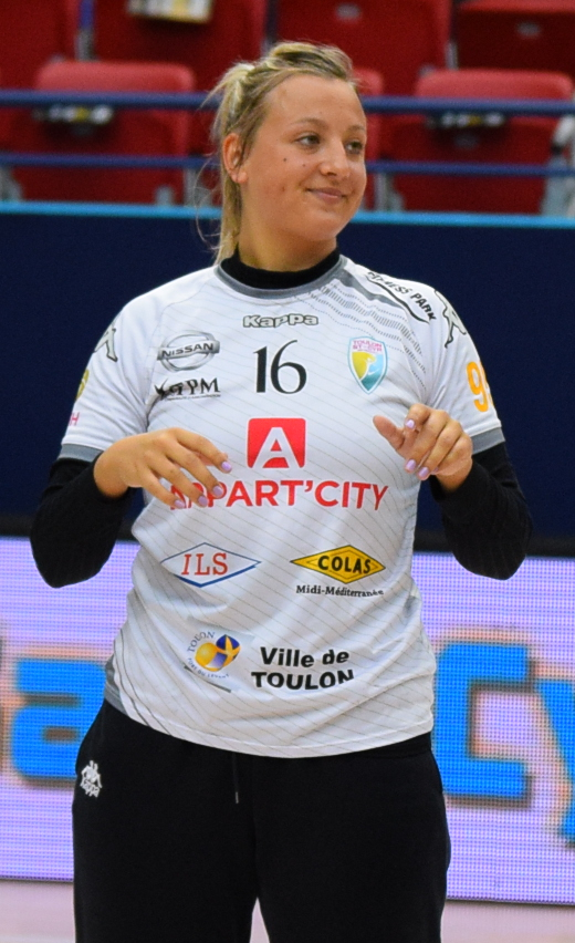 Rencontre de quart de finale retour des playoffs entre Issy Paris Hand et Toulon St Cyr. A Coubertin, le 7 mai 2017.